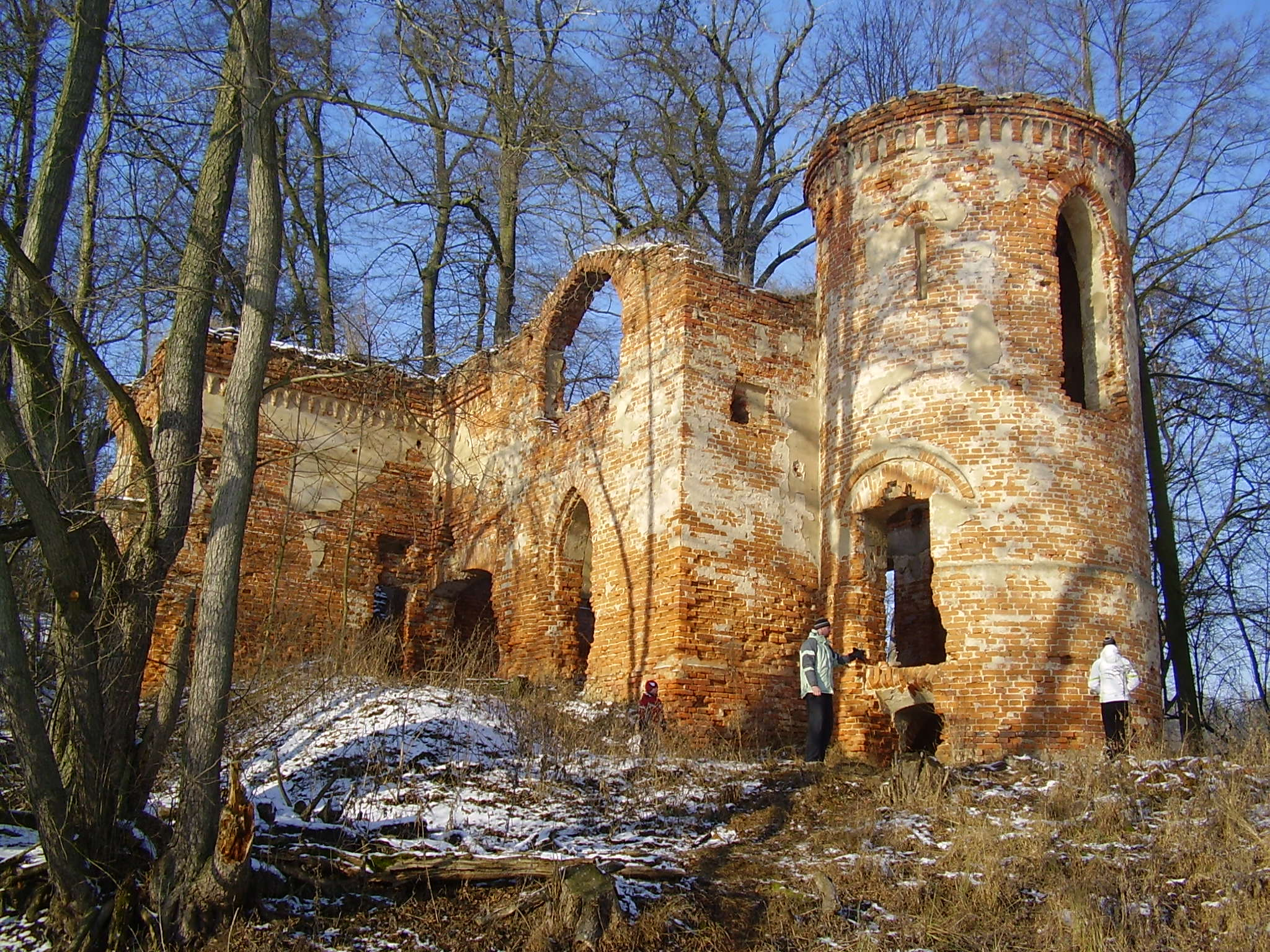 Trzebaw - ruiny zameczku Klaudyny Potockiej z 1822 r. na wyspie jeziora Góreckiego (zabytek nr 1753/A)